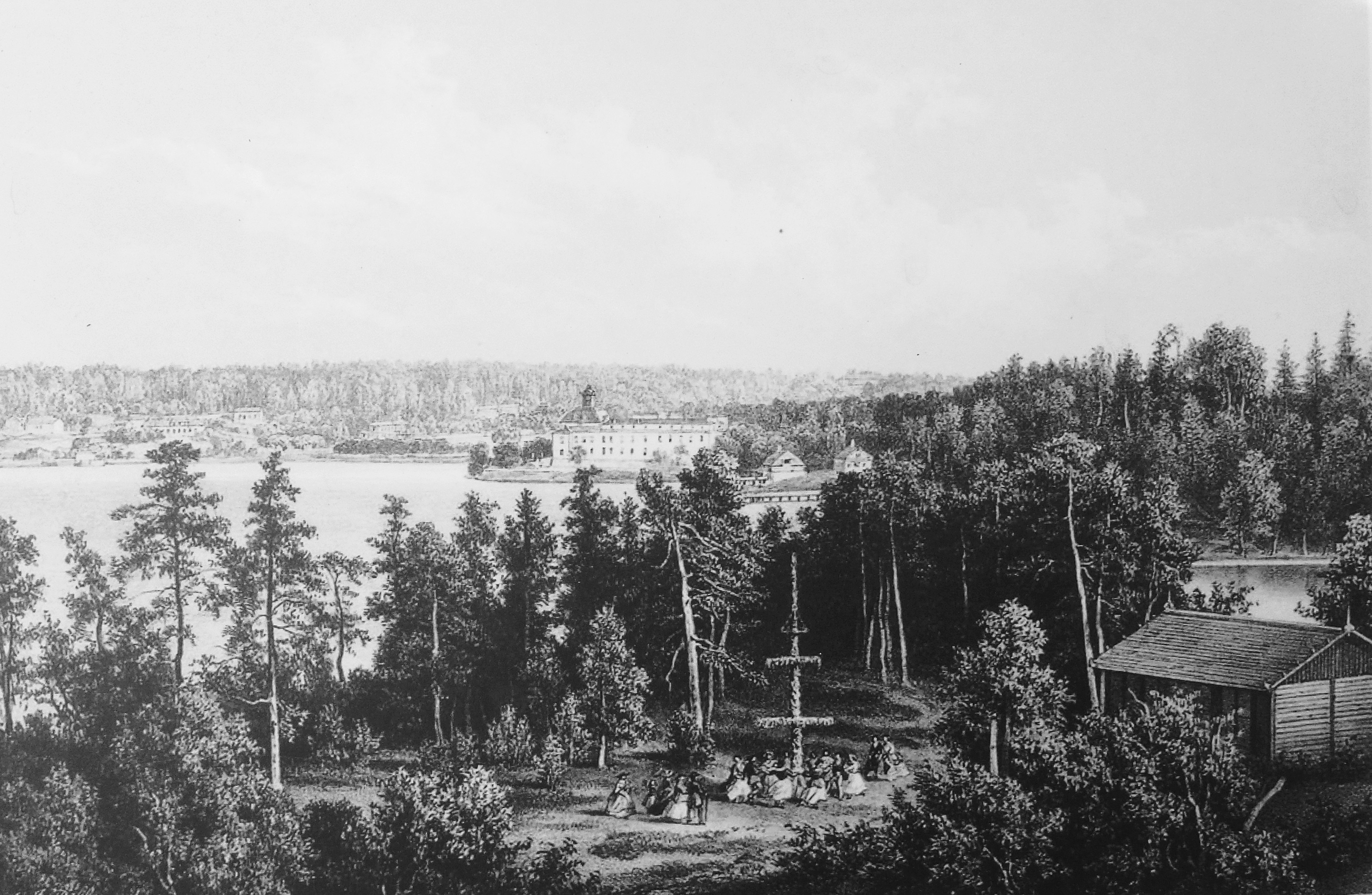 Midsommarfirande på Kaninholmen, i bakgrunden syns Ulriksdals slott